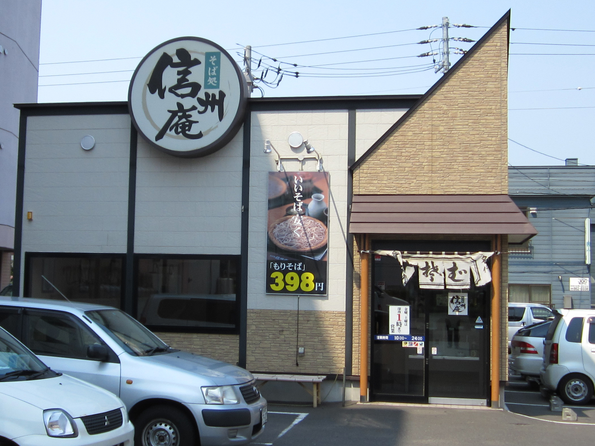 そば処南郷信州庵 札幌市白石区南郷通20丁目